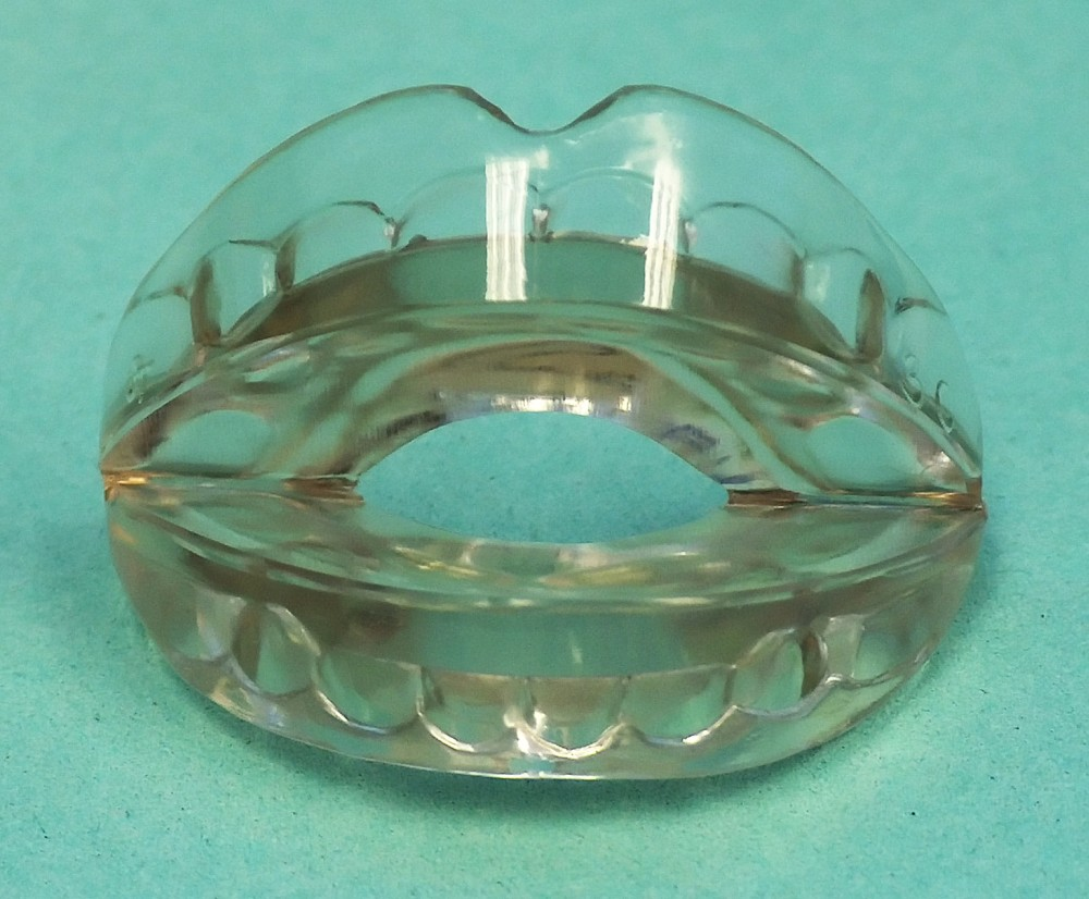 my work